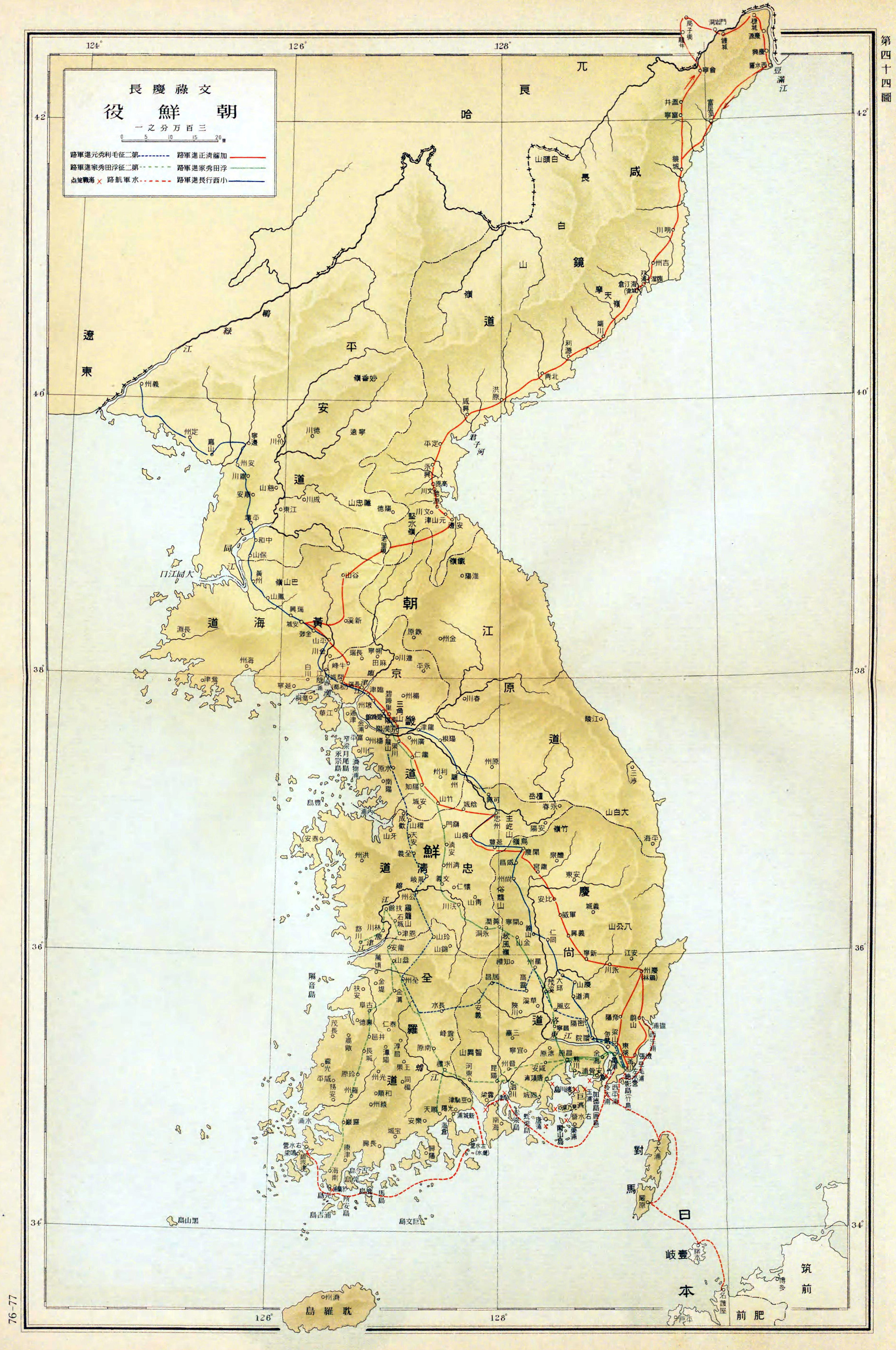 文禄・慶長の役、『大日本読史地図』より。富山房（出版年：1935年）